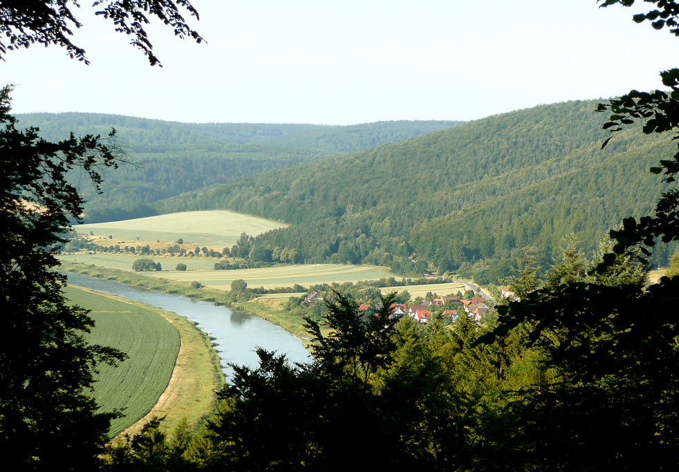 Bramwald und Ortsteil Glashütte von der Bramburg aus gesehen